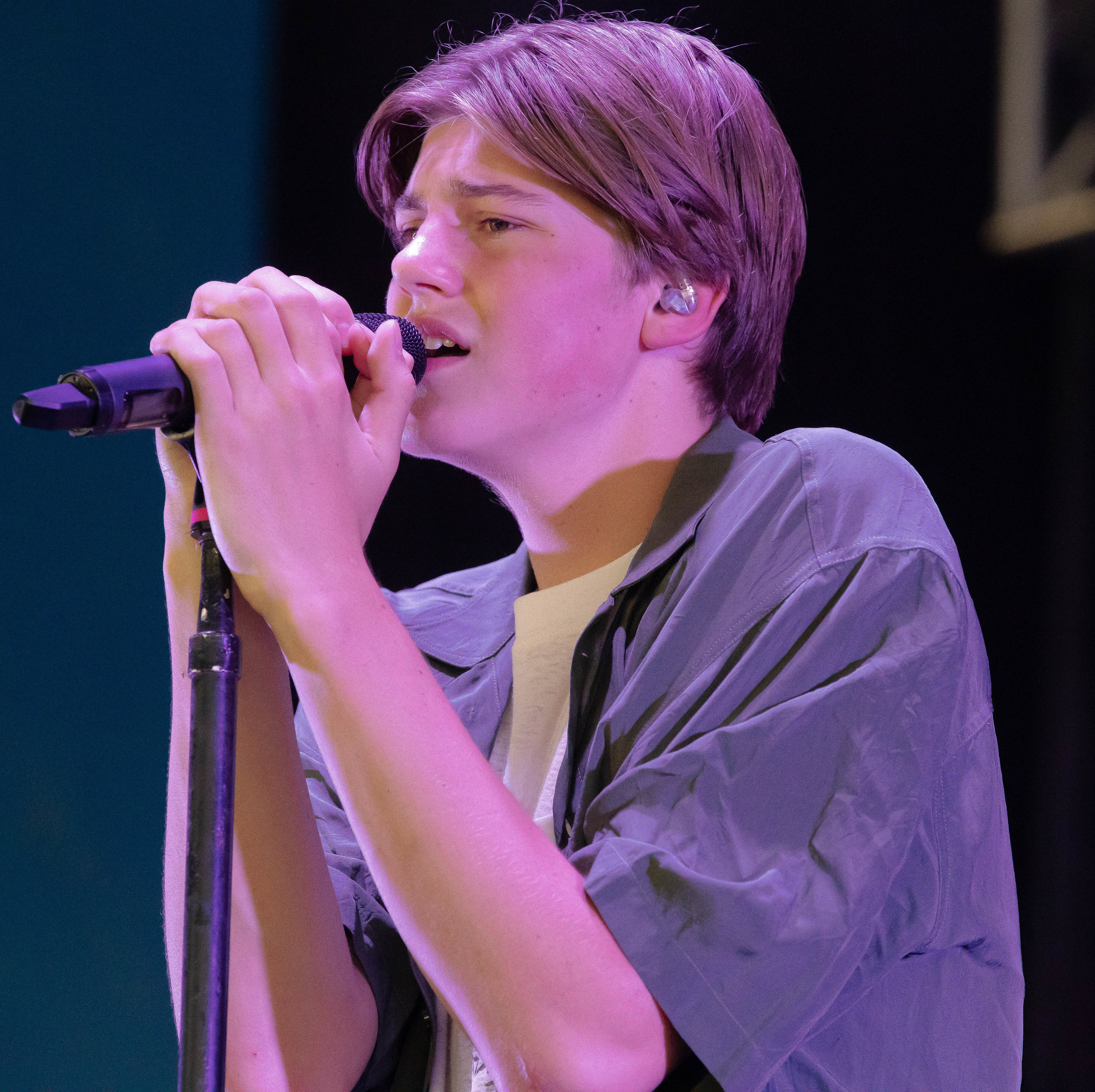 Ruel